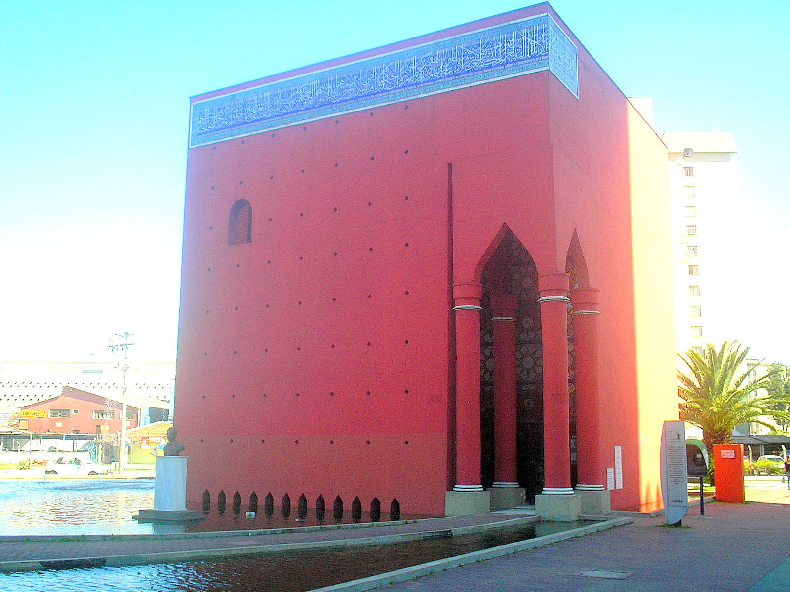 Memorial Árabe, na Praça Gibran Khalil Gibran, em Curitiba, Paraná, Brasil.